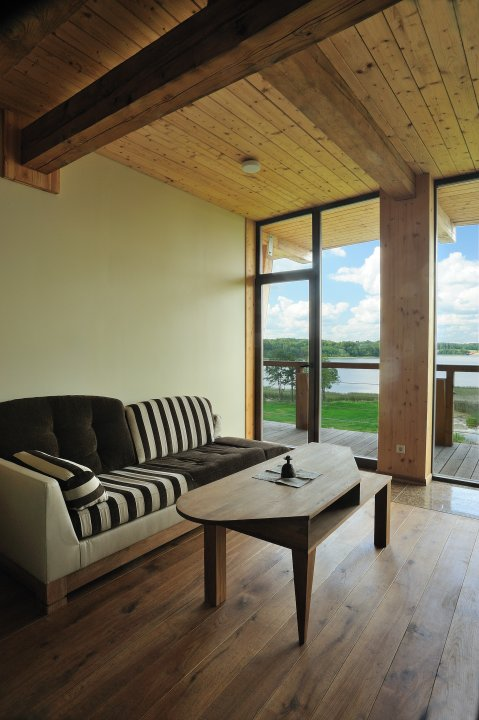 Dvaro viešbutyje įrengtas kambarys